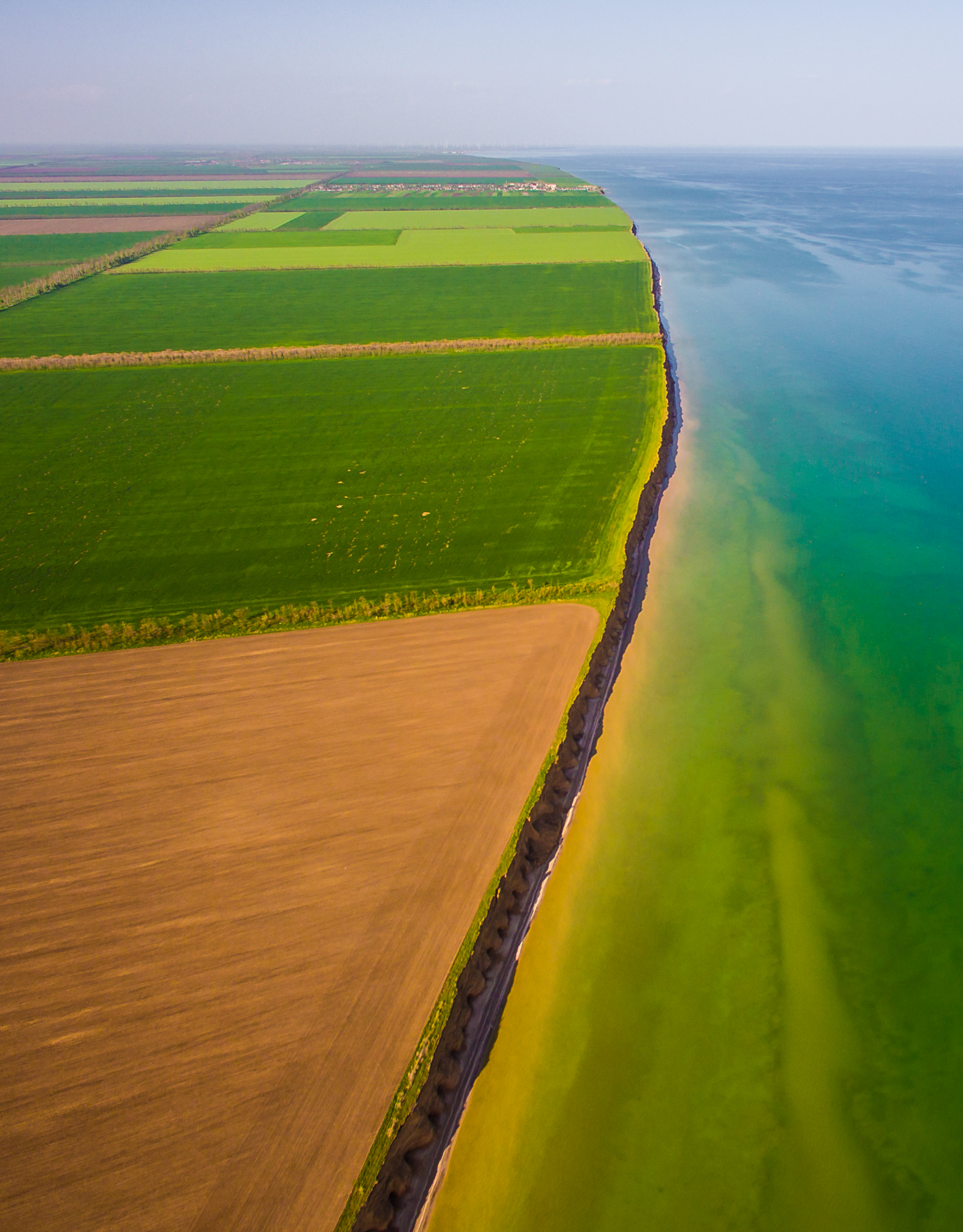 «Приазовський національний природний парк», Бердянський, Мелітопольський, Приазовський райони, міста Бердянськ та Мелітополь